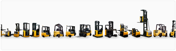 atlet-trucks-models